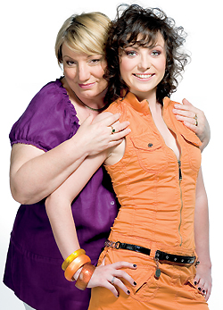 Rúzsa Magdi és édesanyja a Nők Lapja fotózásán.